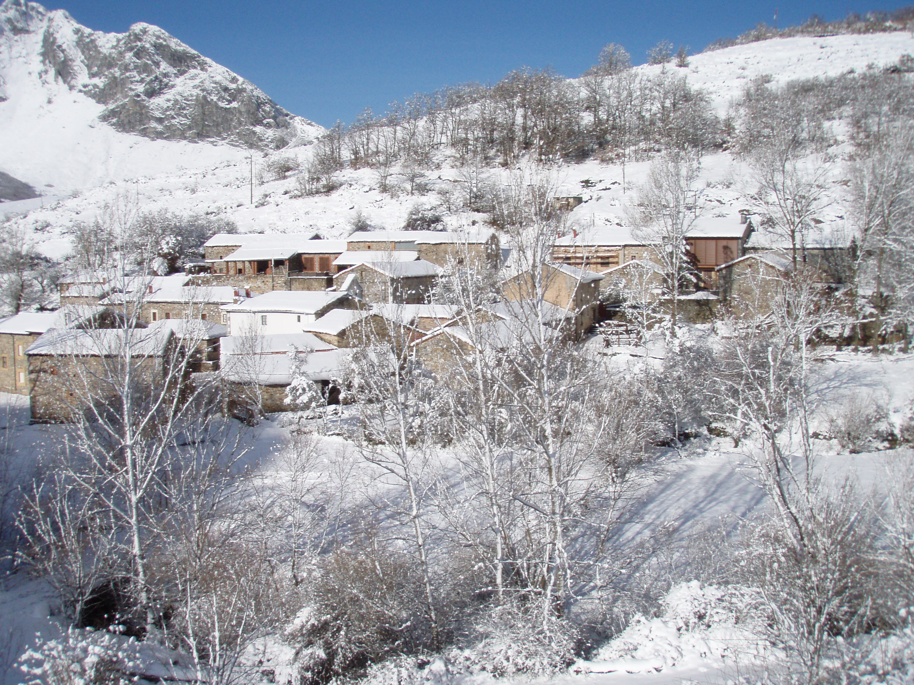 Primeras nevadas del invierno